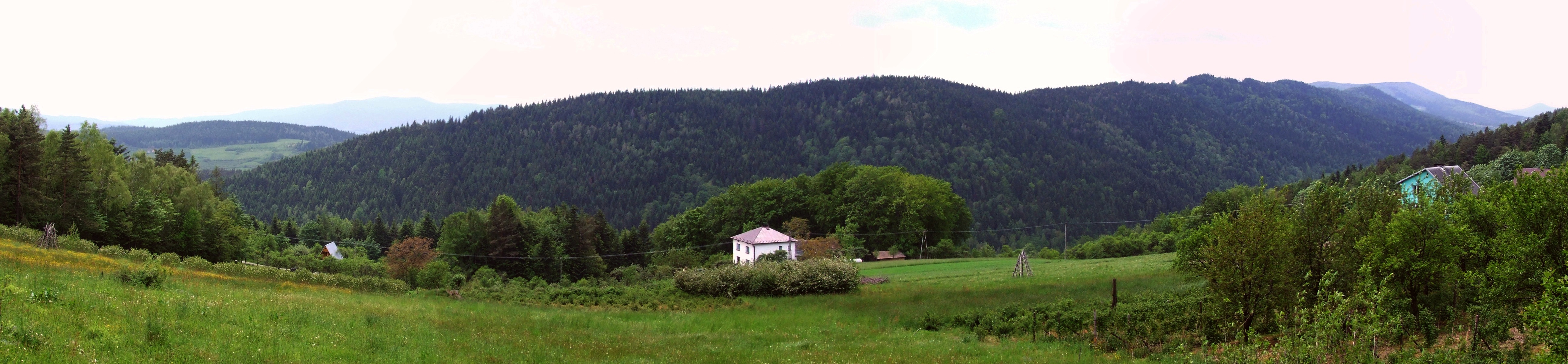 Widok z polany Skiełka na pasmo Modyni i dolinę potoku Jastrzębik